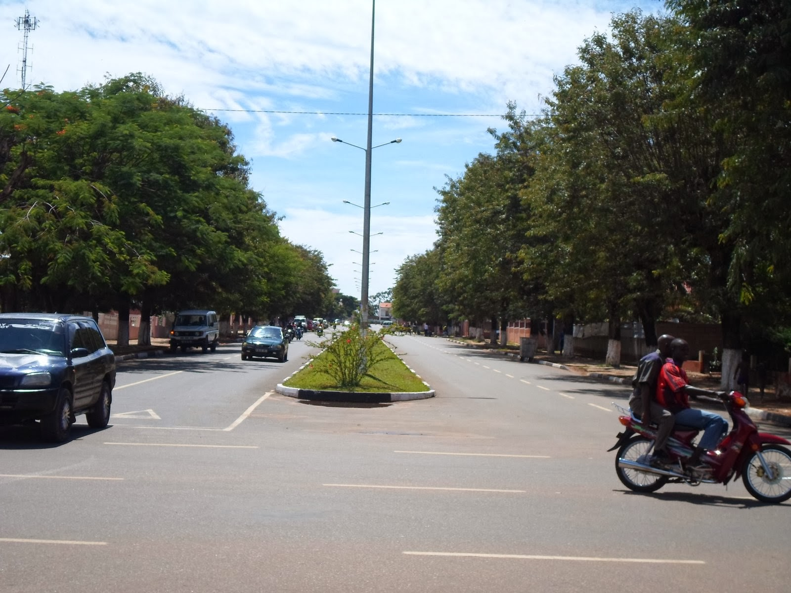 ruas no interior da cidade lunda-sul